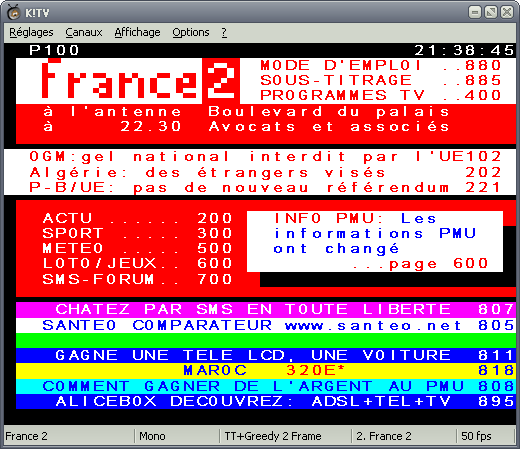 Télétexte sous K!TV